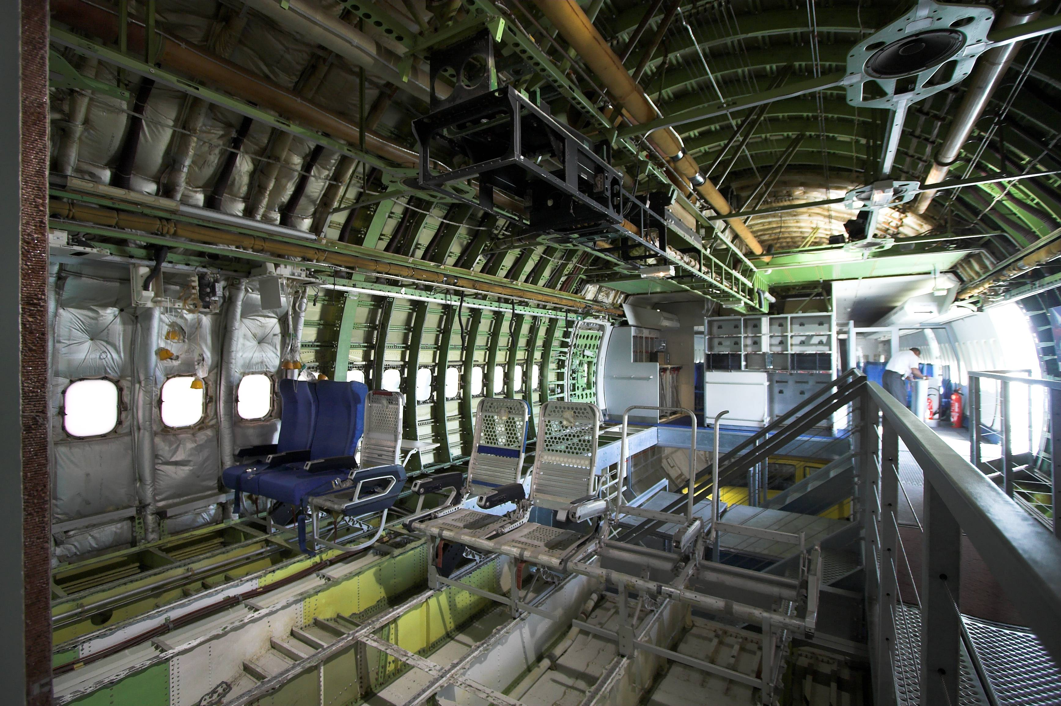 Boeing 747 in the Museum of Air and Space(Musée de l'air et de l'espace, Le Bourget, France)